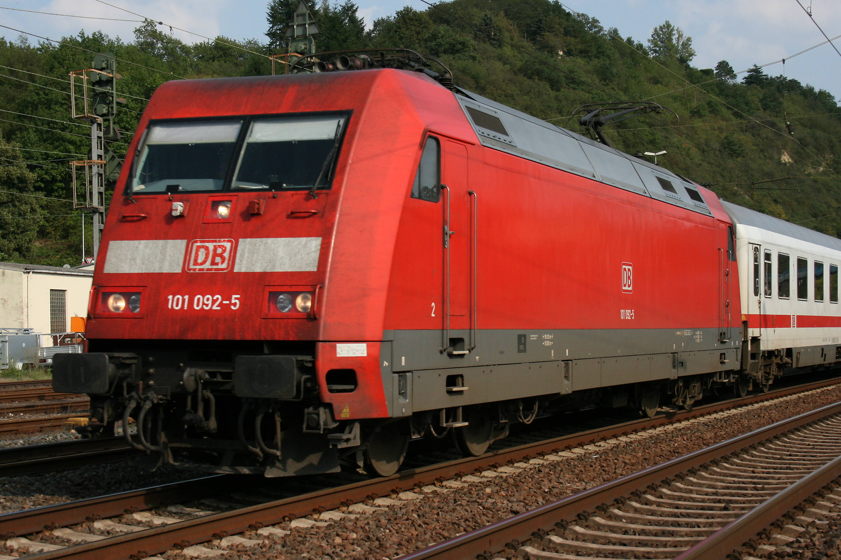 die Lokomotive 101 092-5 der Baureihe 101 vor Linz am Rhein